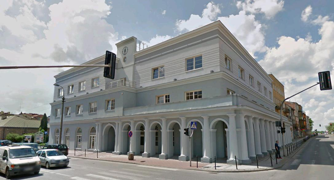 Sochaczew, hale targowe (kramnice miejskie), 1 poł. XIX